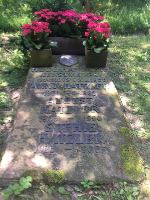 Grabstätte von Hugo Hatzler und Familie